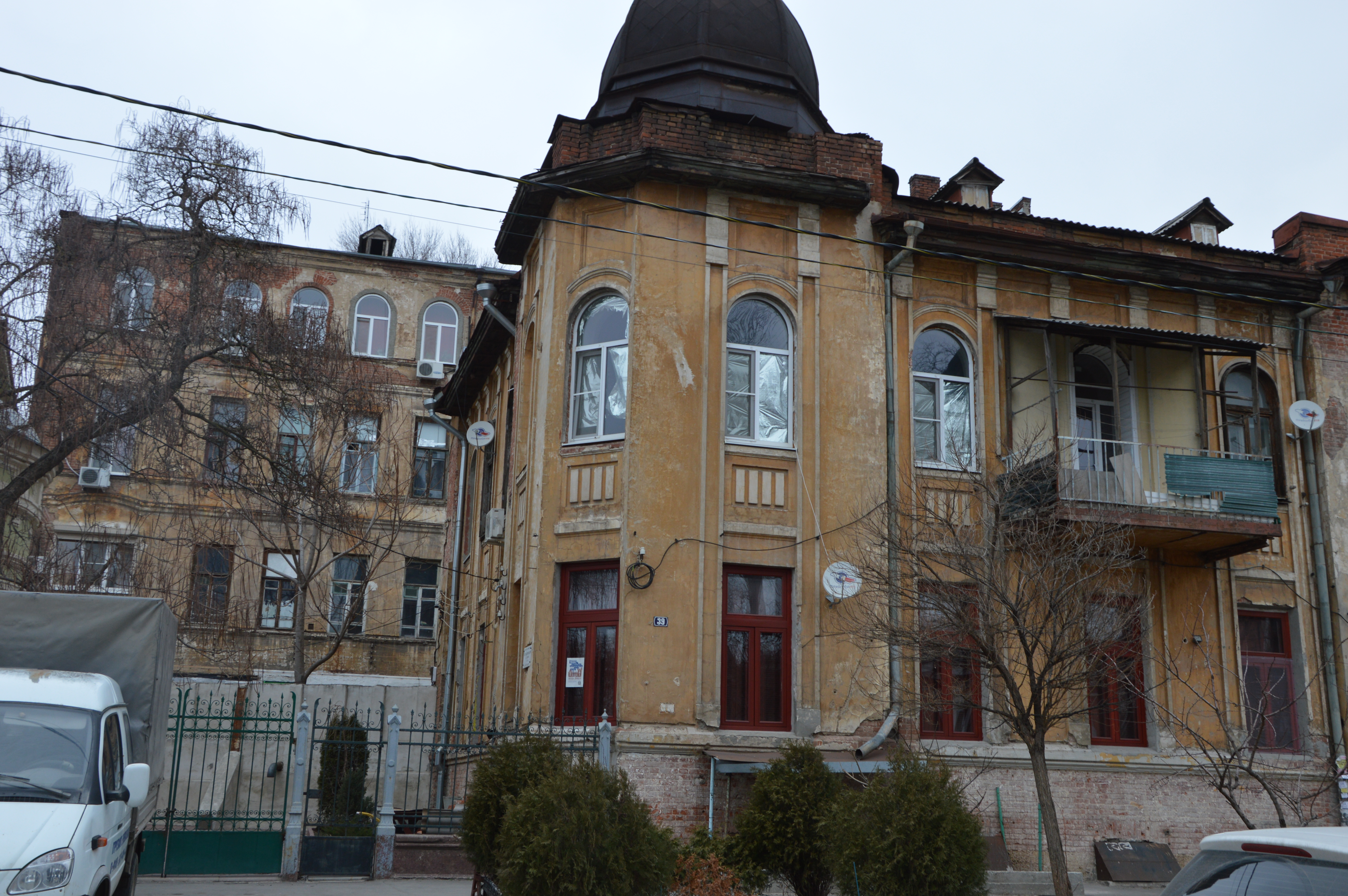 Здание города Ростова-на-Дону